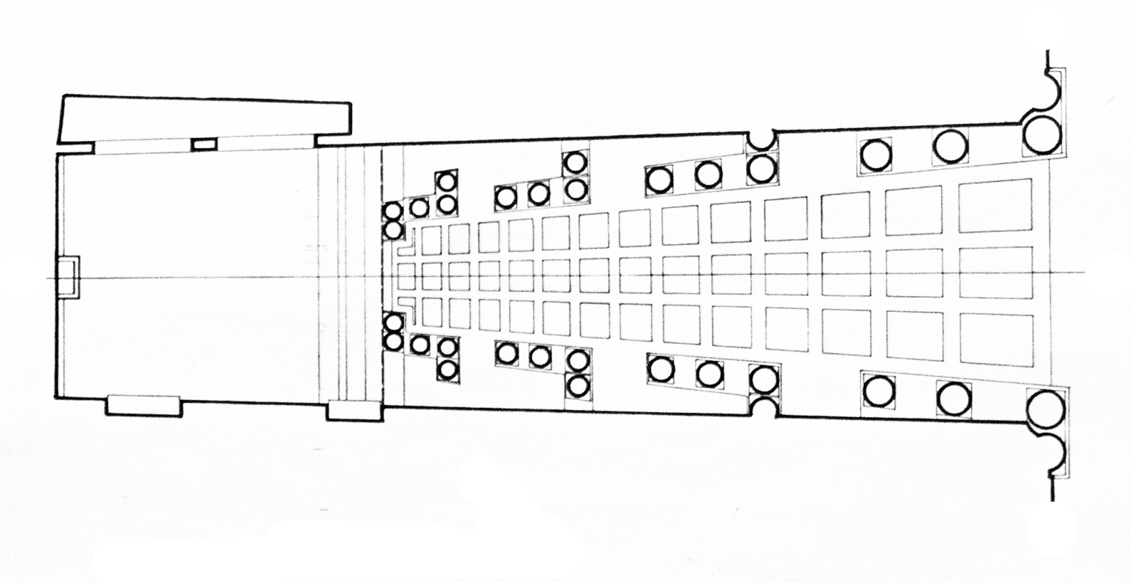 Description Plan de la galerie du Palazzo Spada à Rome Date8 February 2006SourceRelevé d'architectureAuthorAnamorphosePermission (Reusing this file) Creative Commons Plan de la galerie du Palazzo Spada à Rome